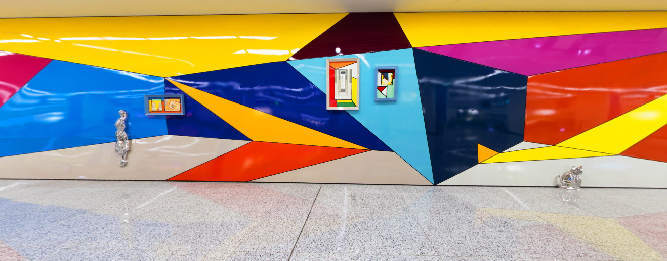 平阳街站文化墙